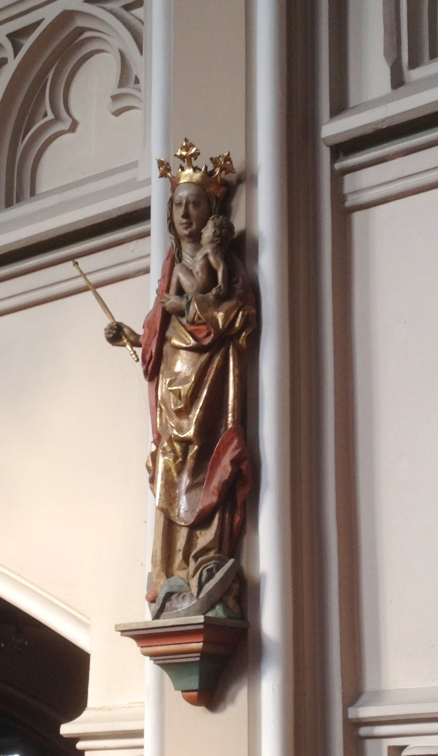 Bad Harzburg, Lutherkirche, Mondsichelmadonna aus der mittelalterlichen Vorgängerkirche